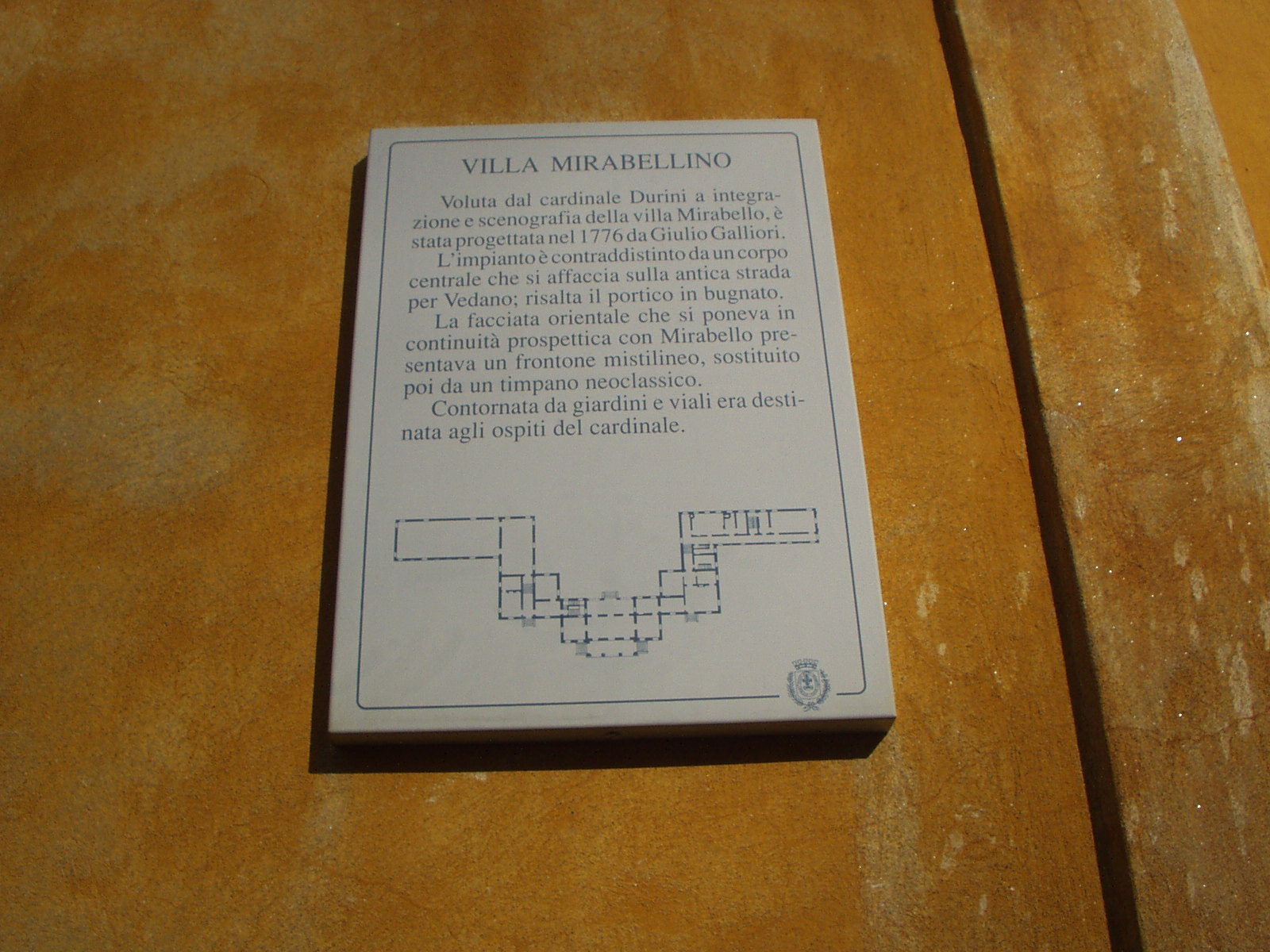 Villa Mirabellino nel Parco di Monza indicazione turistica